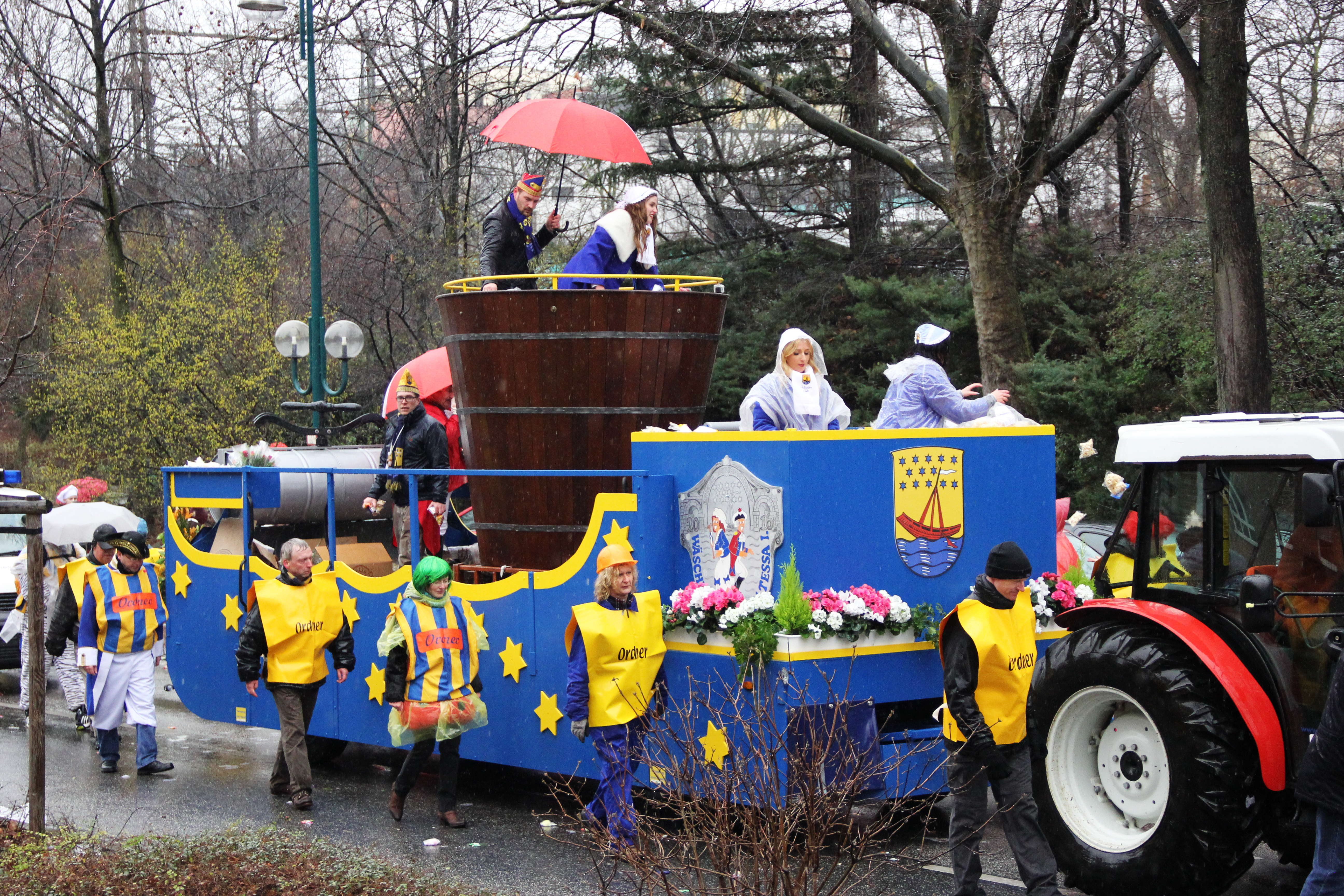 Dr' Zoch kütt! - Wieverfastelovend in Beuel